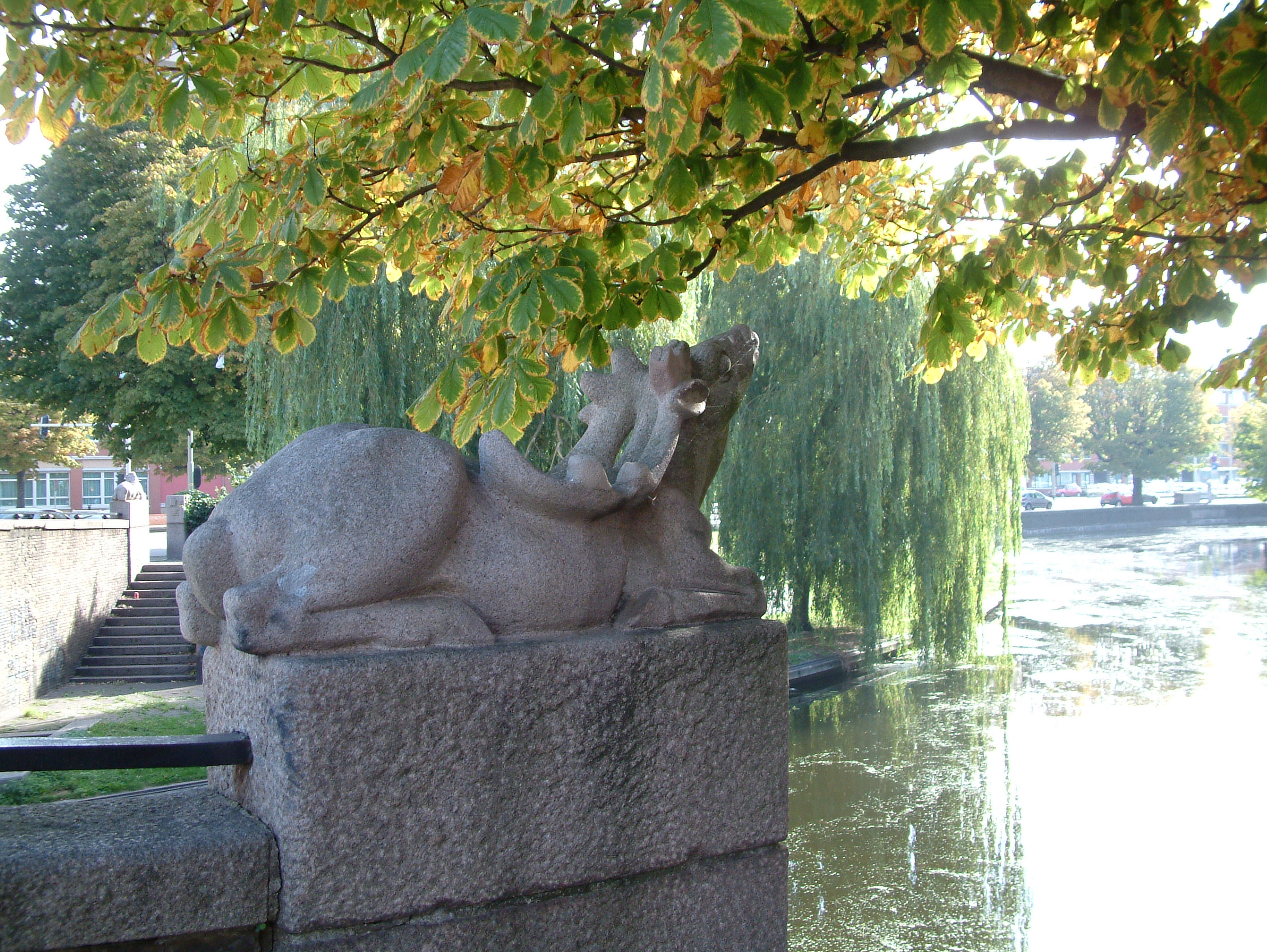 Brug in Den Haag